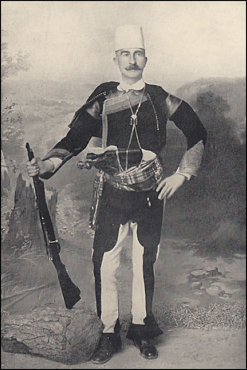 Sir Robert Graves in Albanian dress, Shkodra.